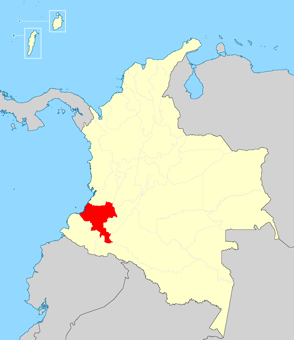 Mapa del departamento de Cauca en Colombia sin Bogotá